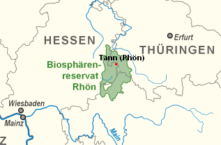 Karte von Tann Biosphärenreservat Rhön in Deutschland